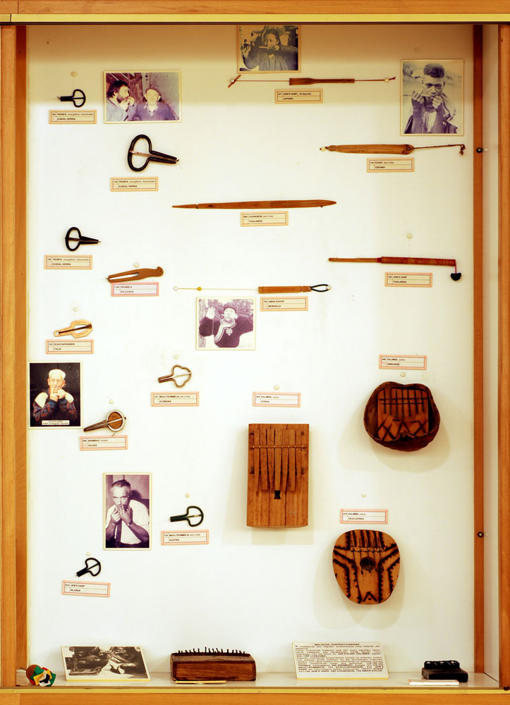 Malguak edo punteatutakoak [1] Soinuenea - Herri Musikaren Txokoa (Traditional Music Centre; former Documentation Center of Popular Music) Oiartzun, Gipuzkoa, Spain